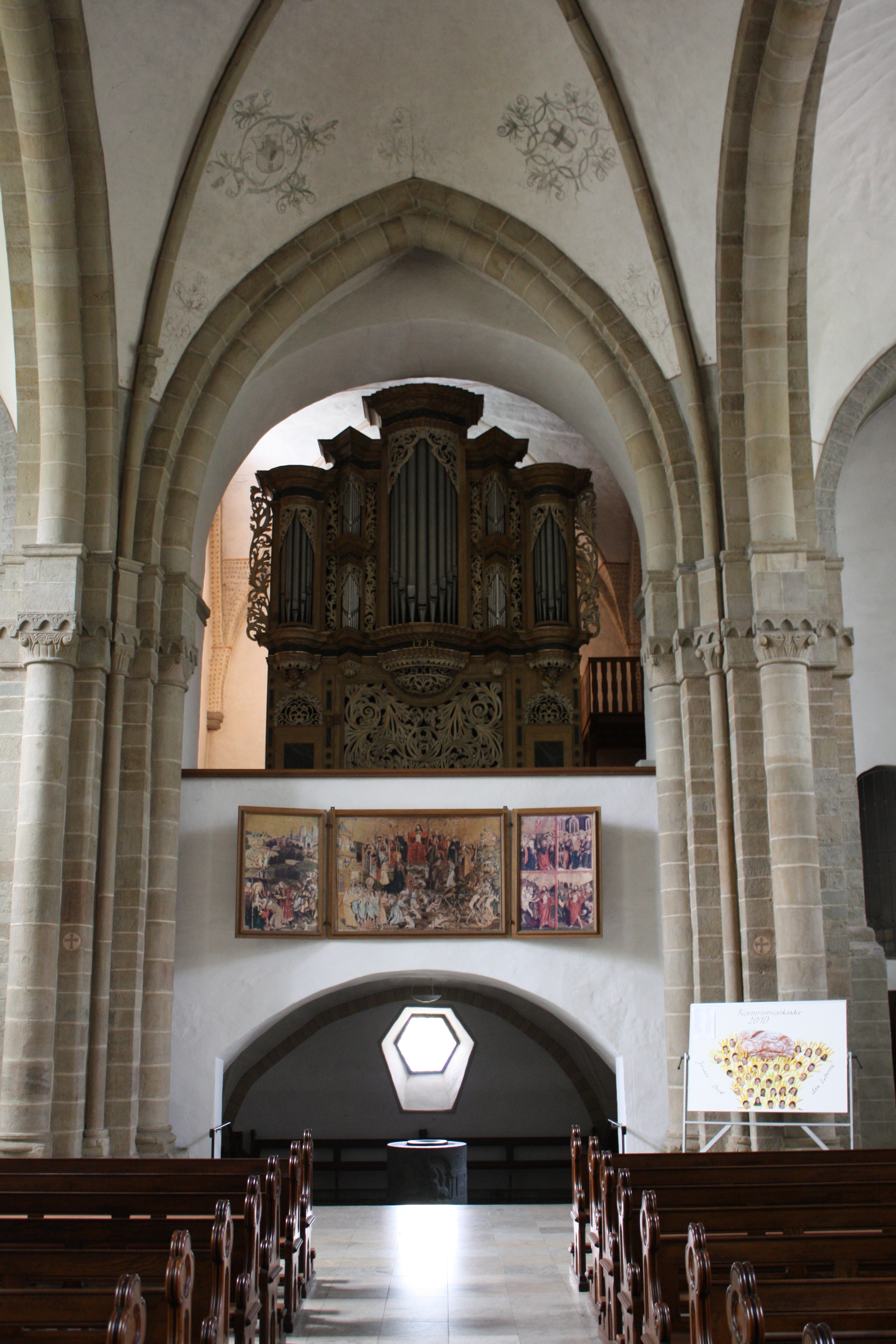 Westwand von St. Cyriakus Geseke